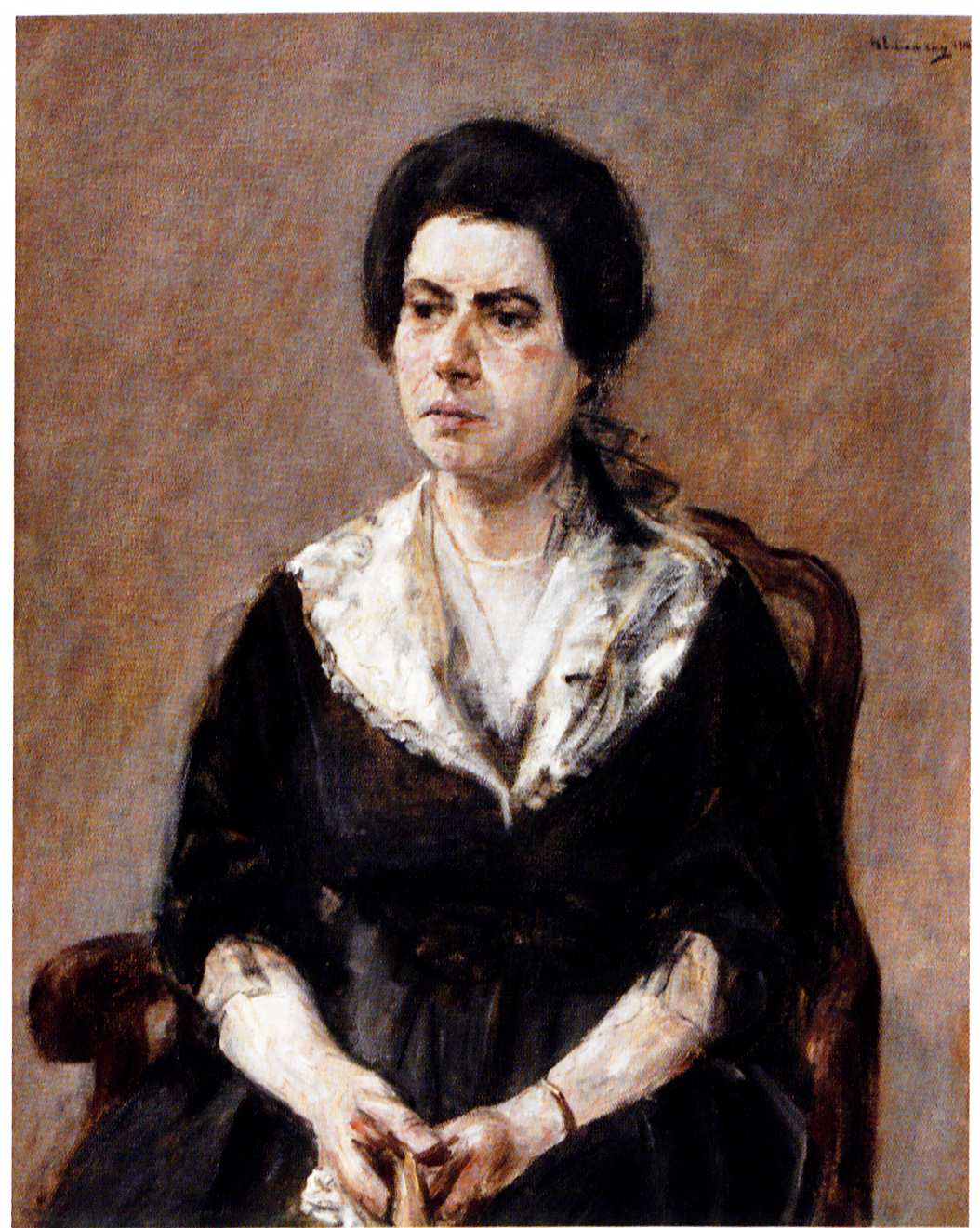 Max Liebermann Bildnis Frau Julie Elias, geb. Levi, 1914 Öl auf Leinwand. 90 x 72 cm. Jüdisches Museum Berlin